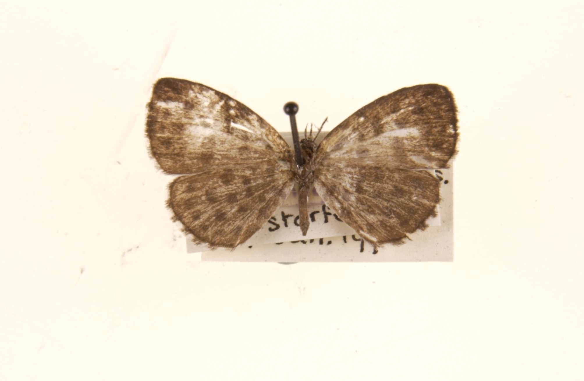 T.hamada